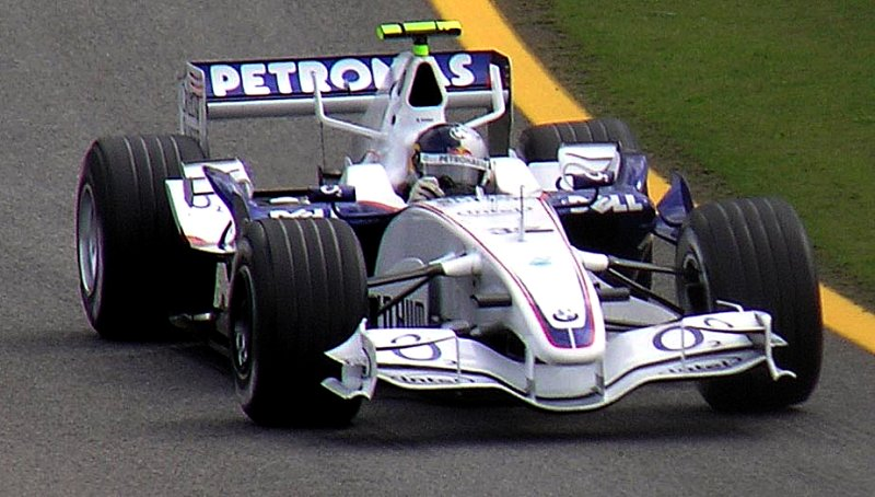 Formula One 2006 Rd.18 Interlagos: #38 Sebastian Vettel (BMW Sauber)